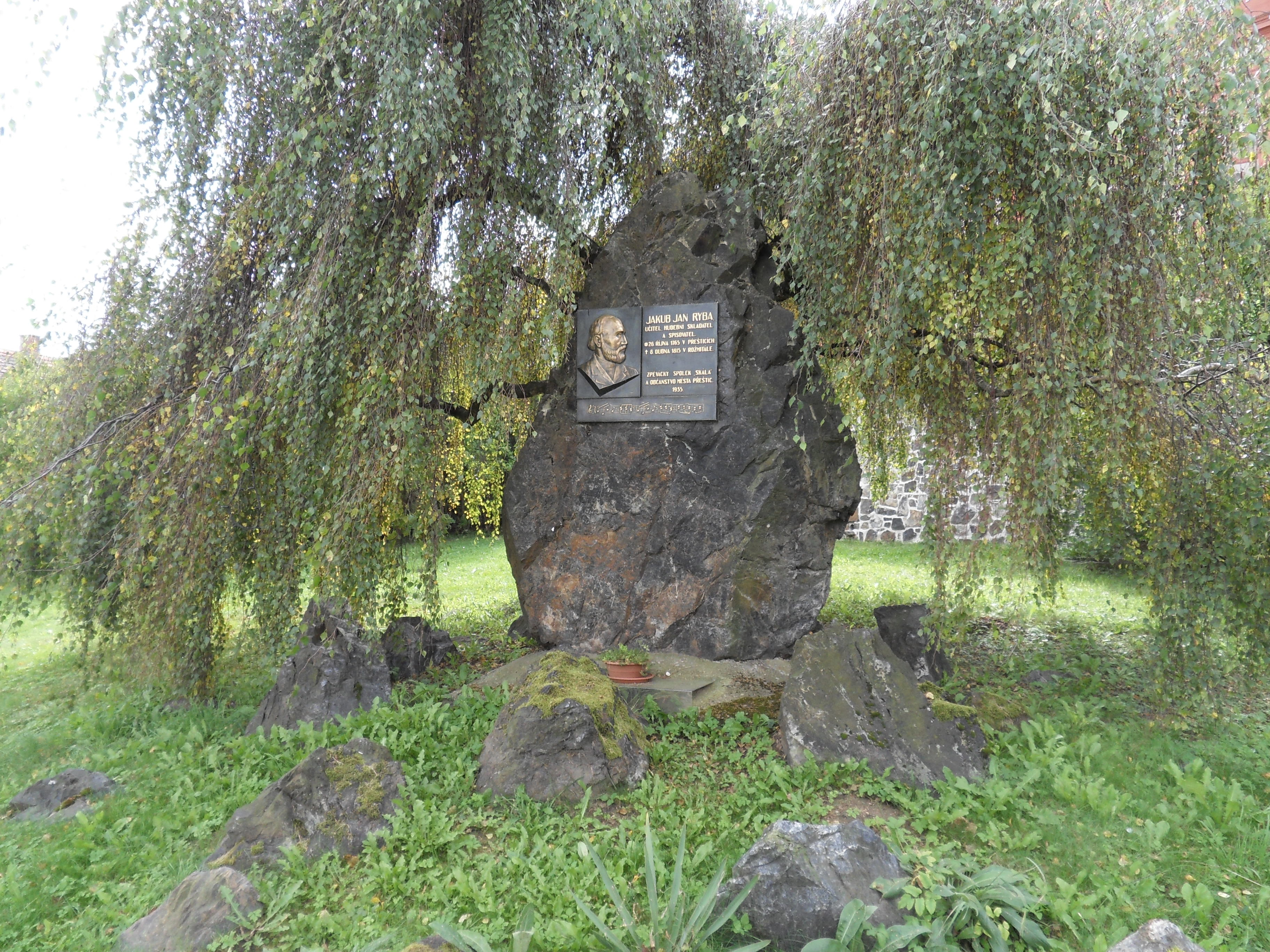 Pomník Jakuba Jana Ryby, pahorek pod kostelem, Přeštice